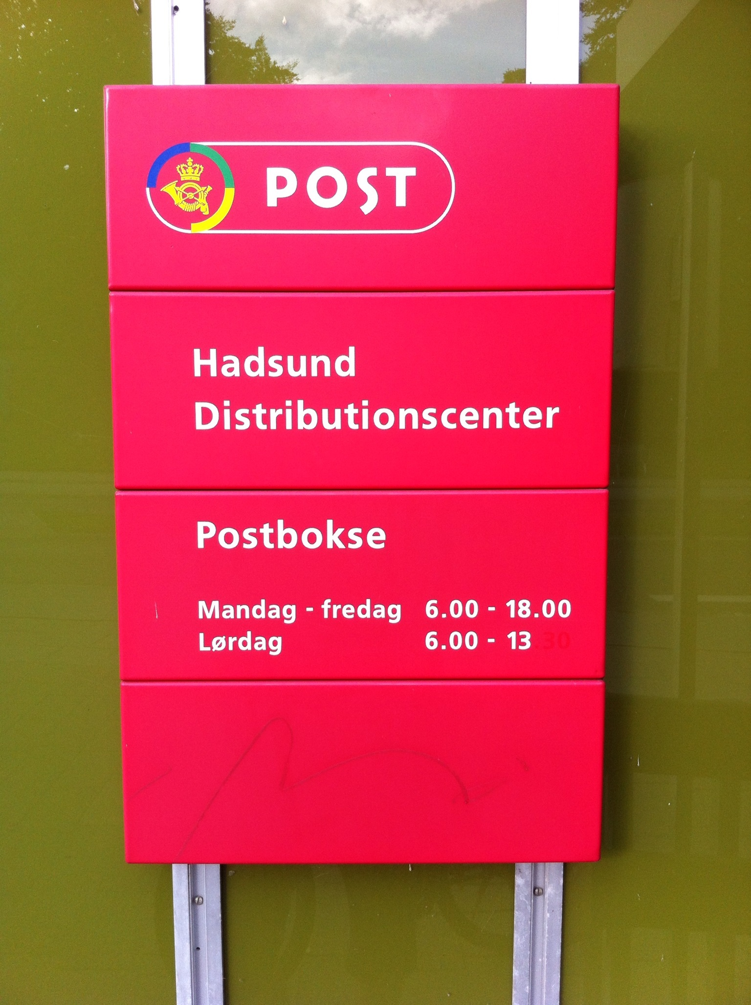 Hadsund Posthus, Himmerlandsgade 10, 9560 Hadsund